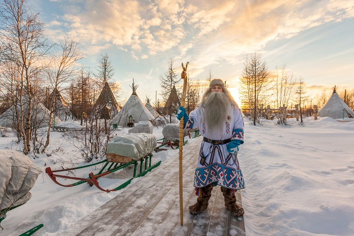 Ямал Ири в своей резиденции в пос.Горнокнязевск